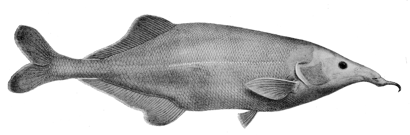 Genyomyrus donnyi